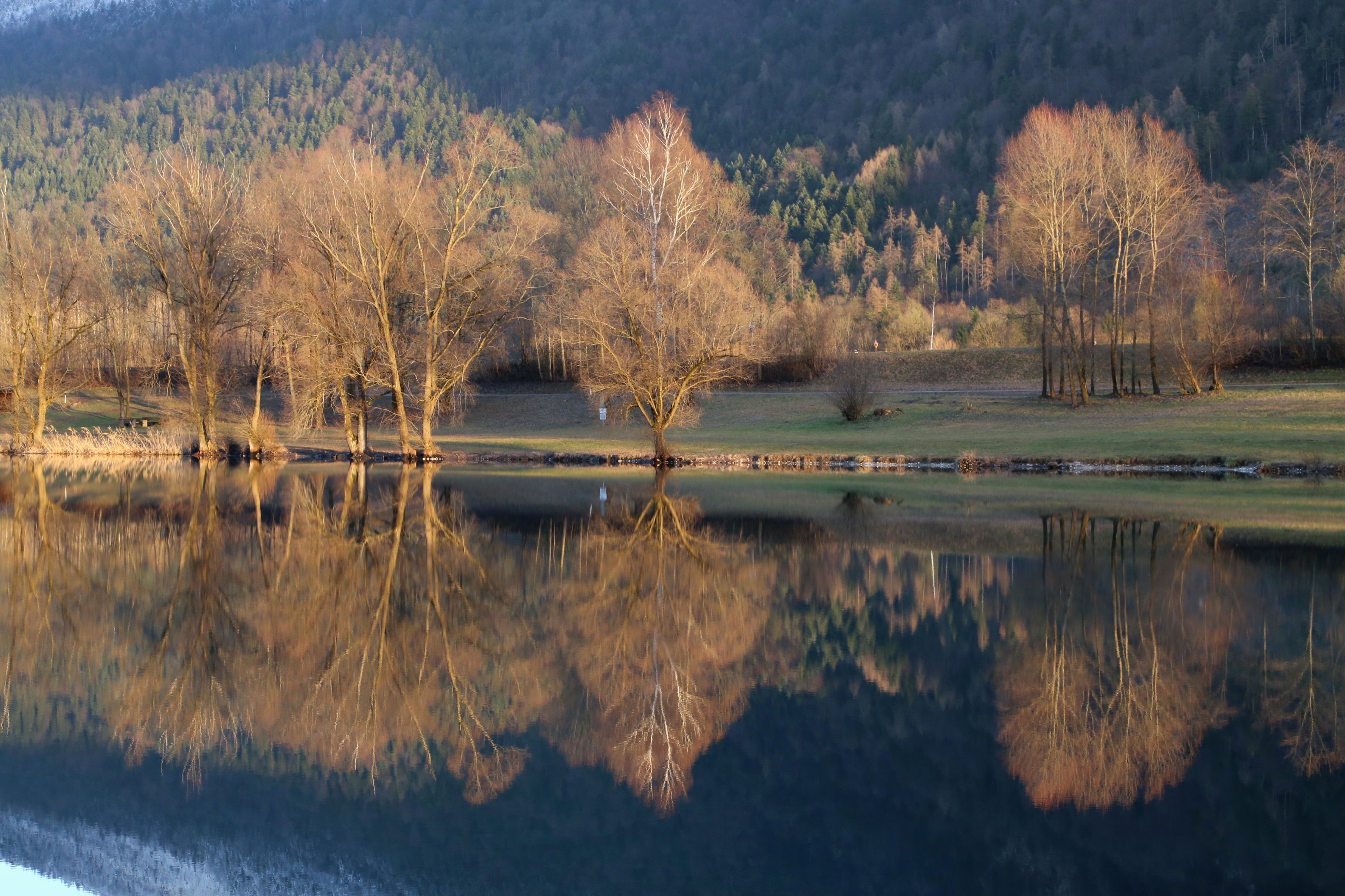 Kieferer See